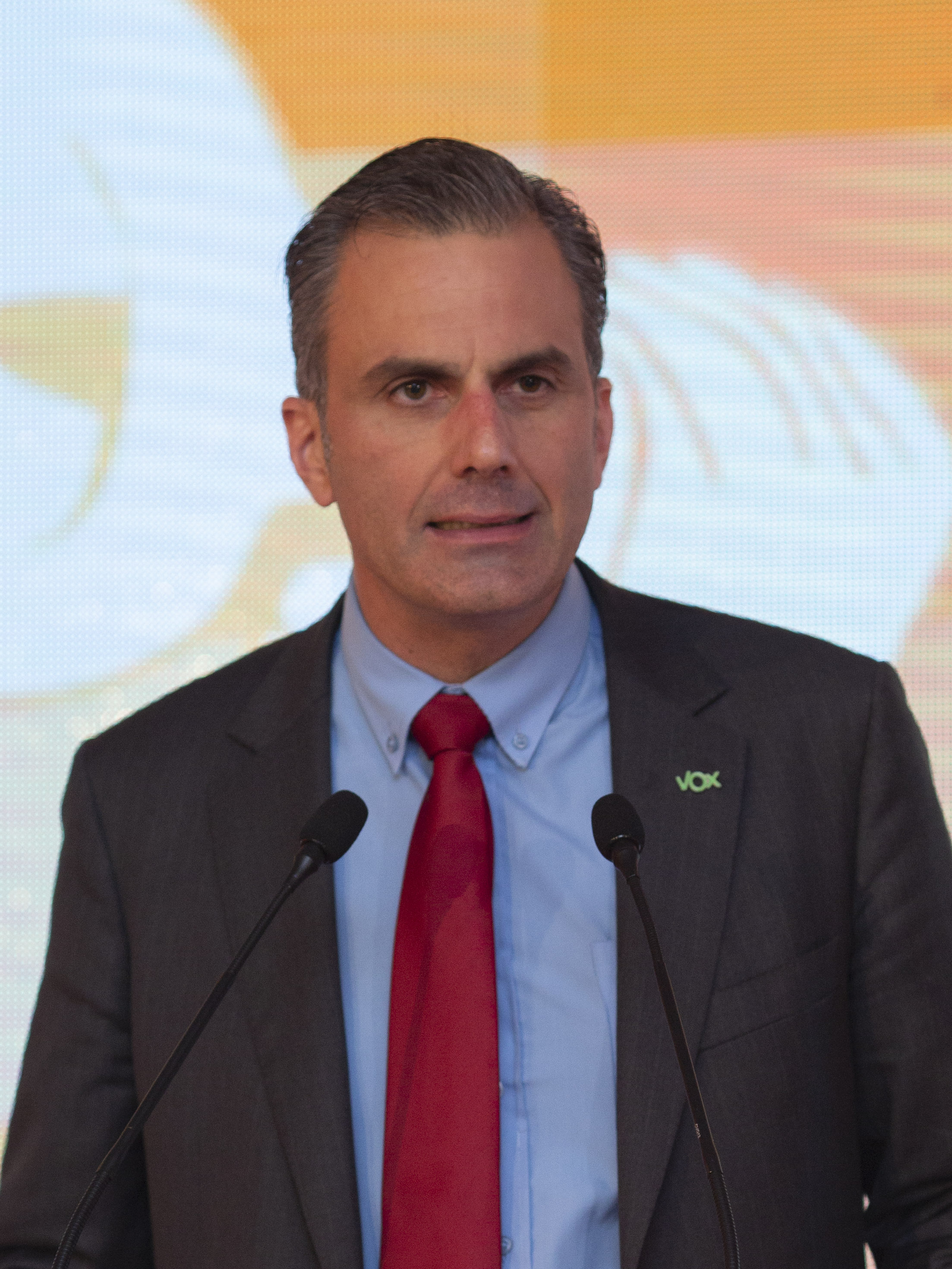 El abogado y secretario general de VOX, Javier Ortega Smith, fue uno de los galardonados